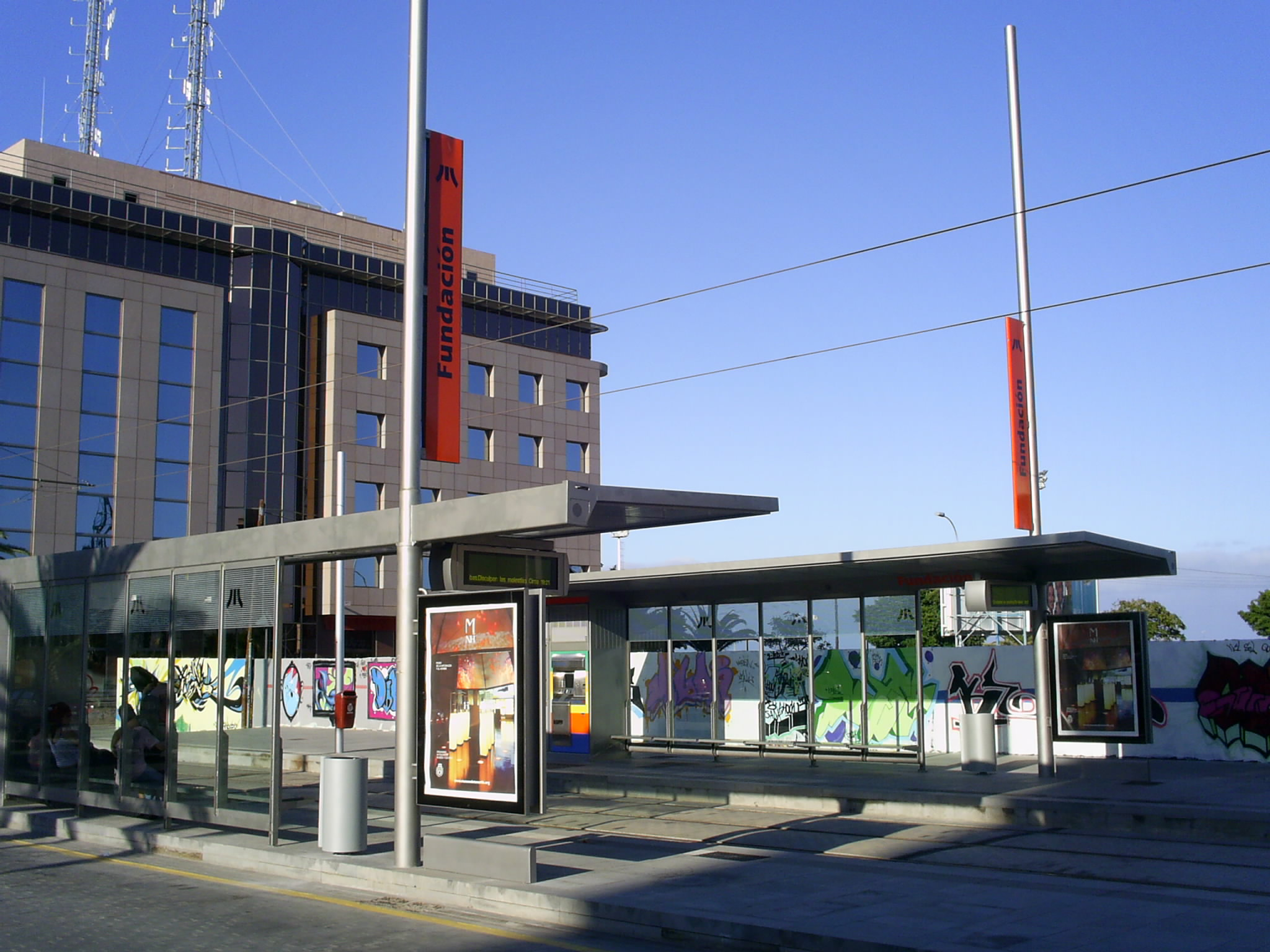 Imágen de la parada "Fundación" del Tranvía de Tenerife.